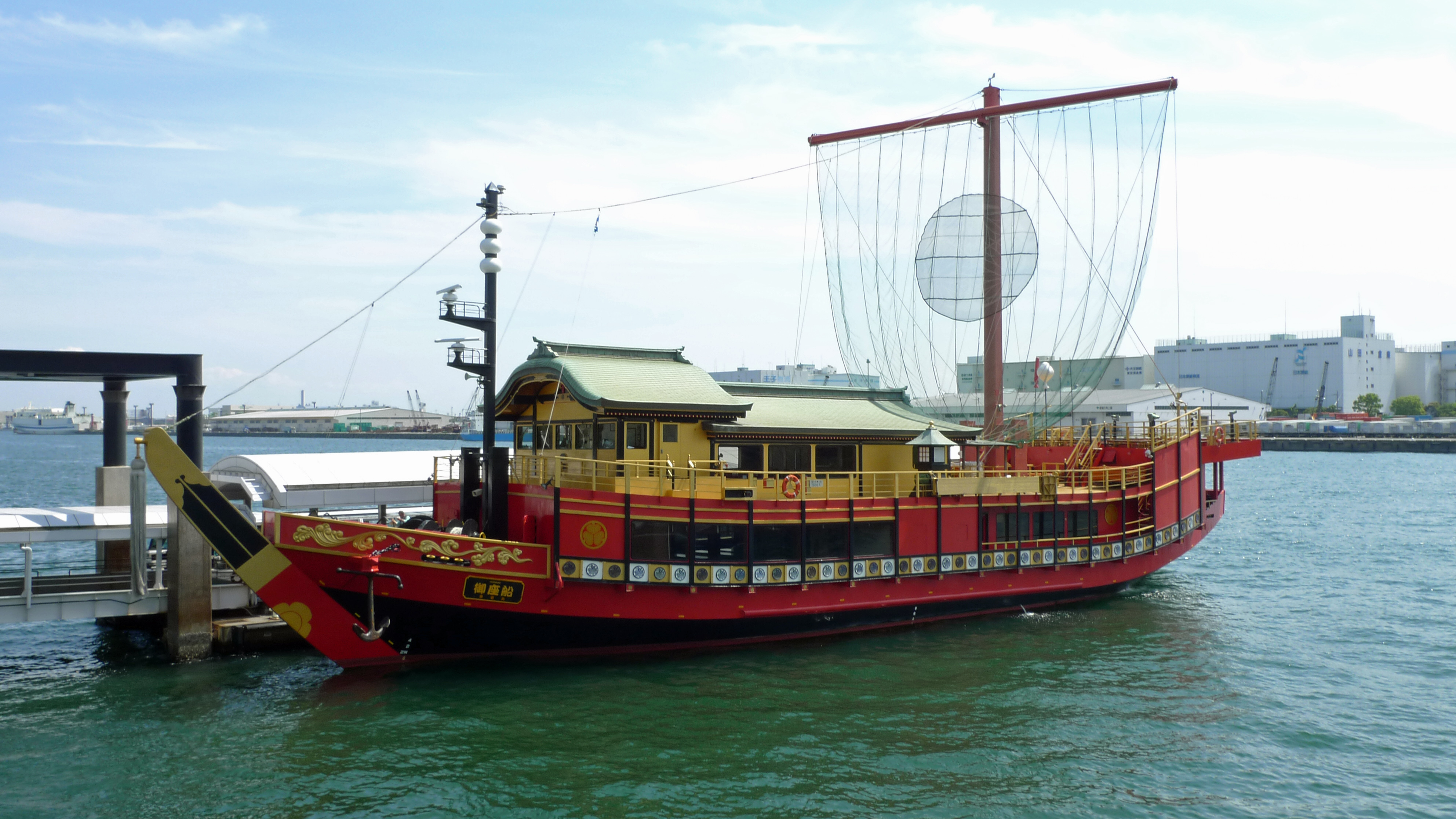 東京都観光汽船安宅丸